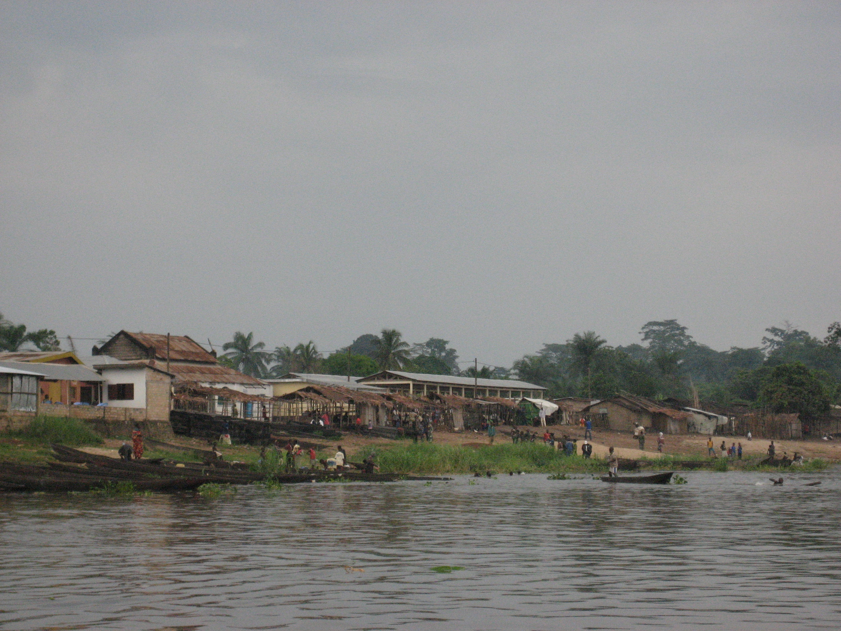 Port de Loukoléla, région de la Cuvette, République du Congo